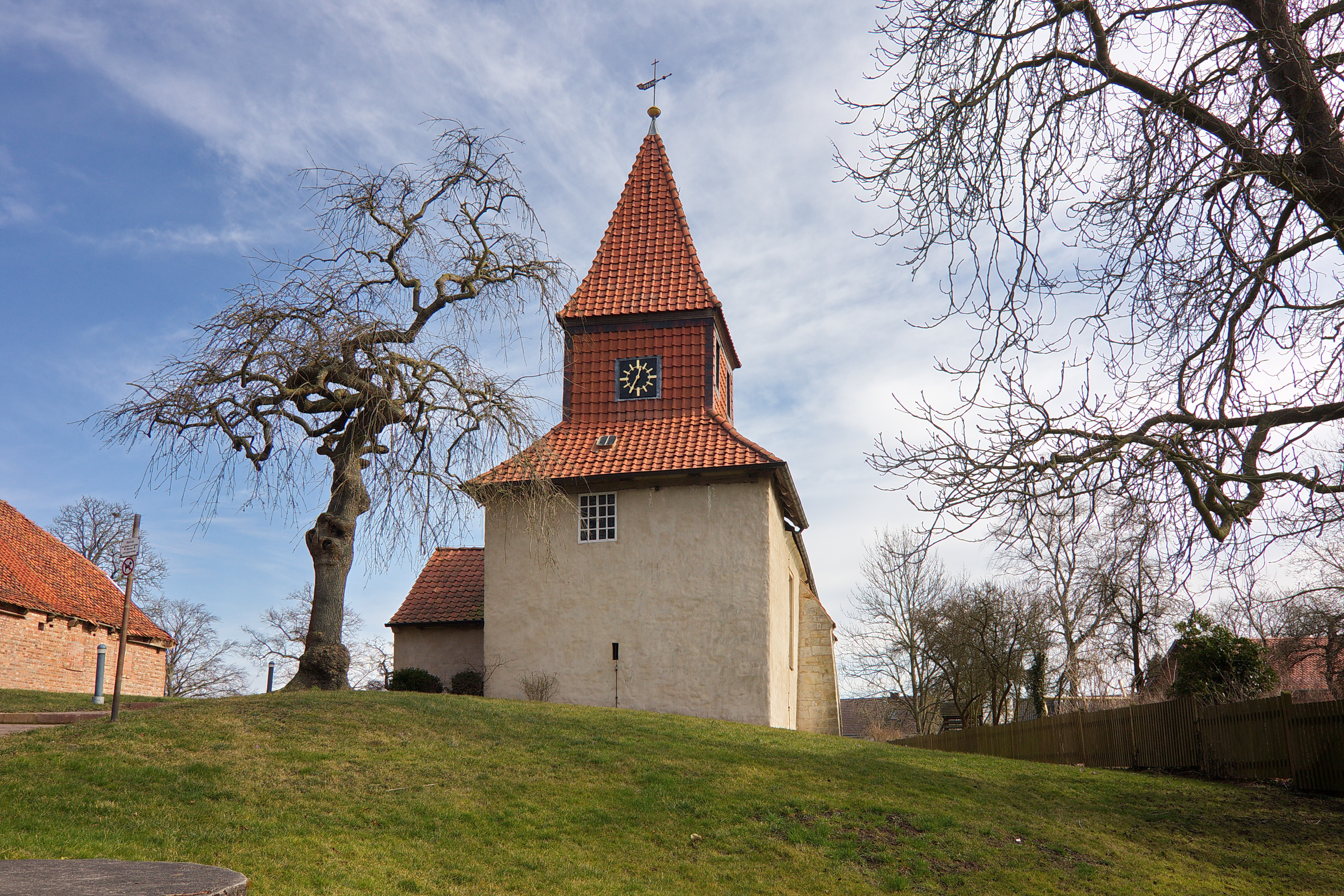 St. Johannes des Täufers-Kirche in Wettmershagen (Calberlah), Niedersachsen, Deutschland